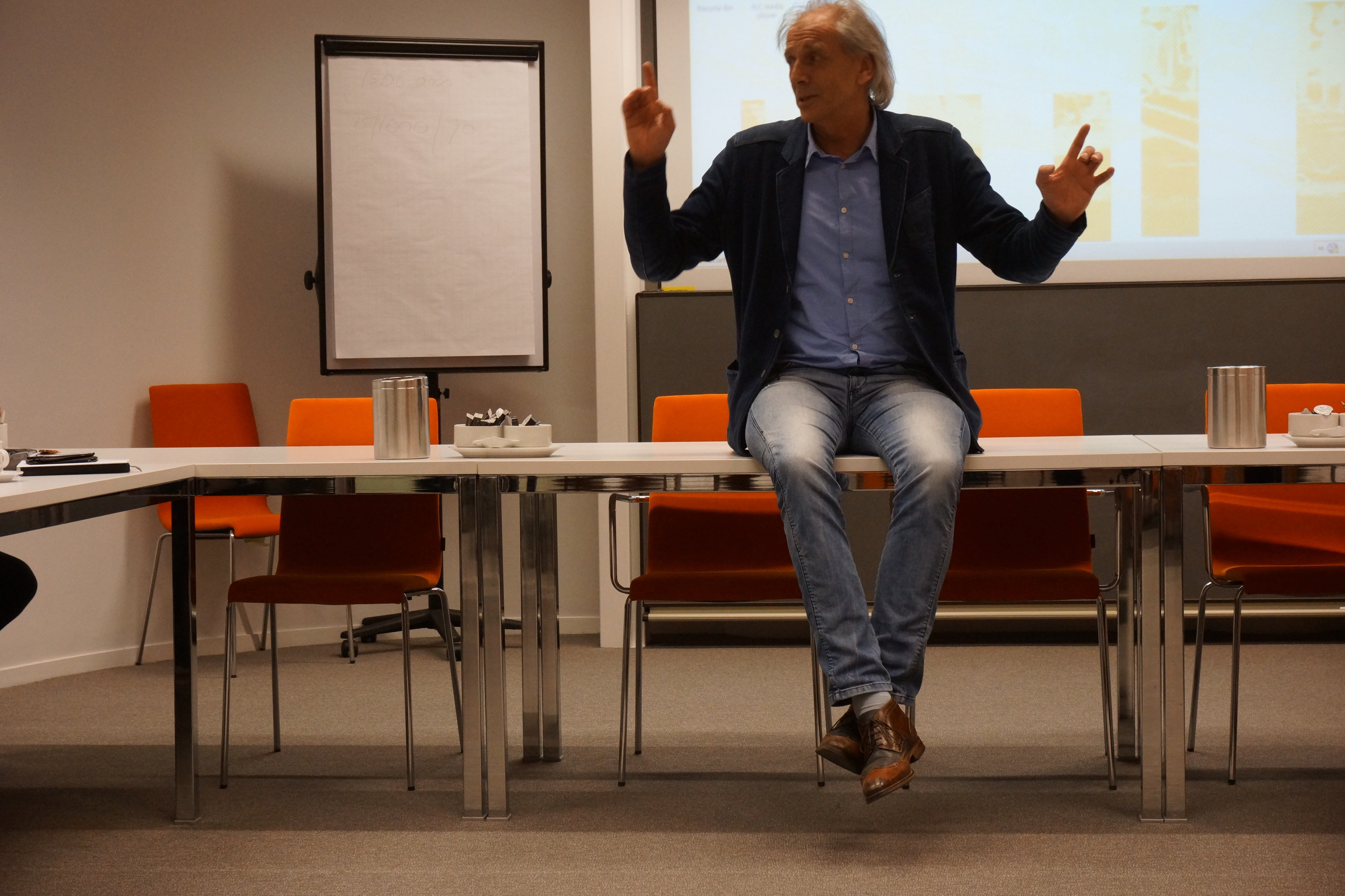 René Bastiaanse, directeur van het Brabants Historisch Informatie Centrum, in 2014.